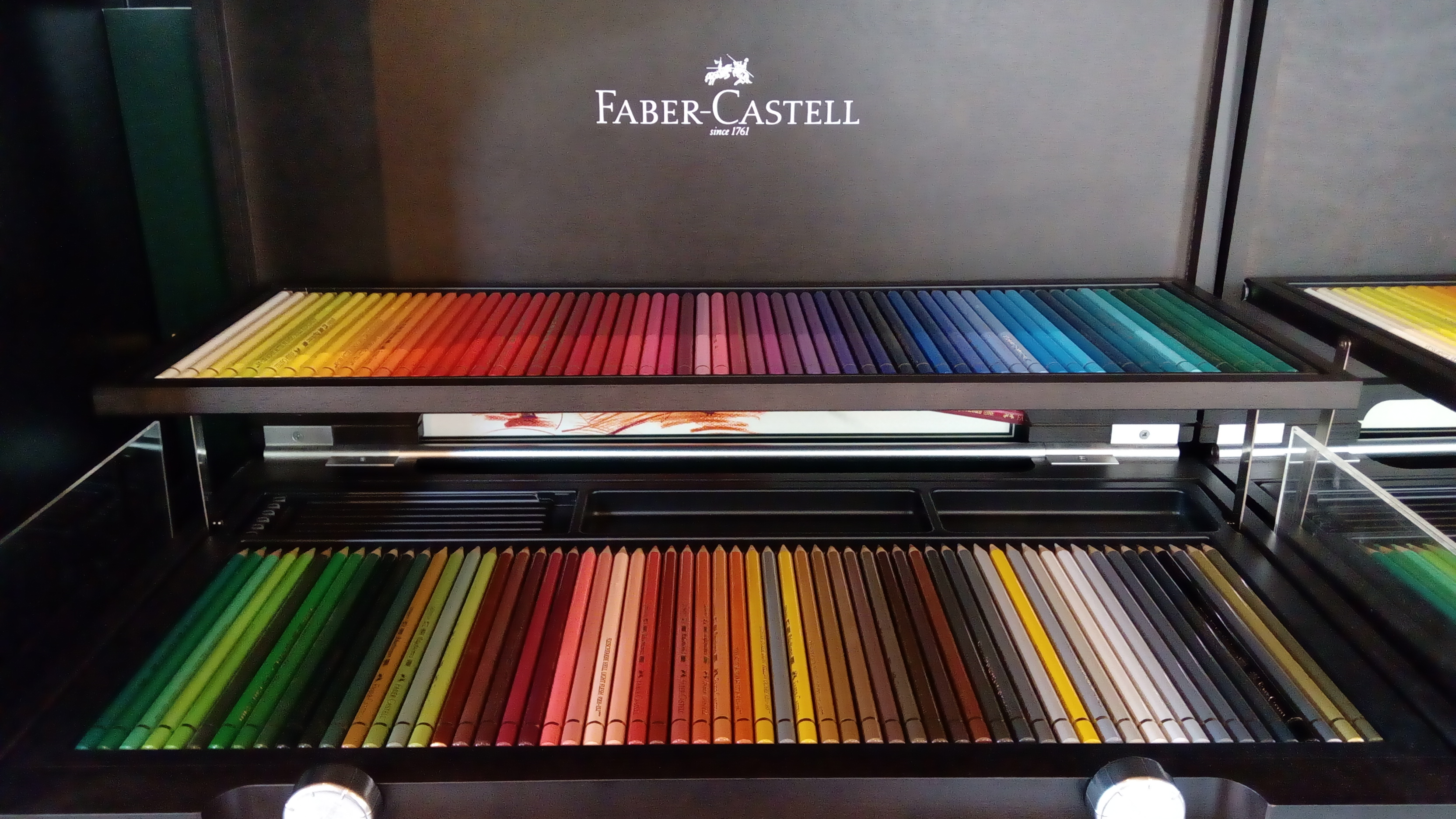 Faber-Castell Bakı Kitab Mərkəzində